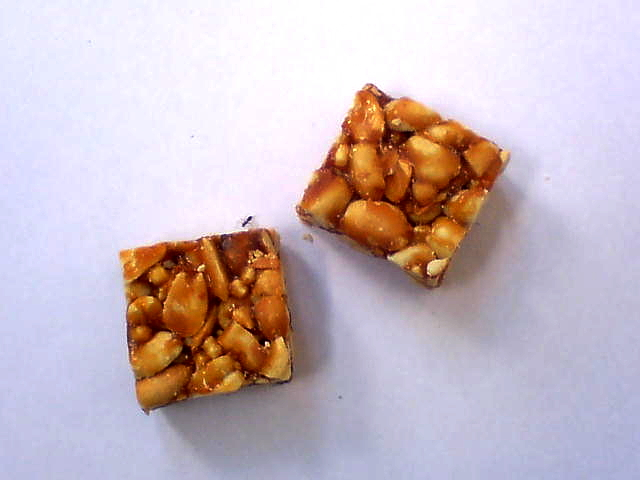 கடலை மிட்டாயும் எறும்பும்